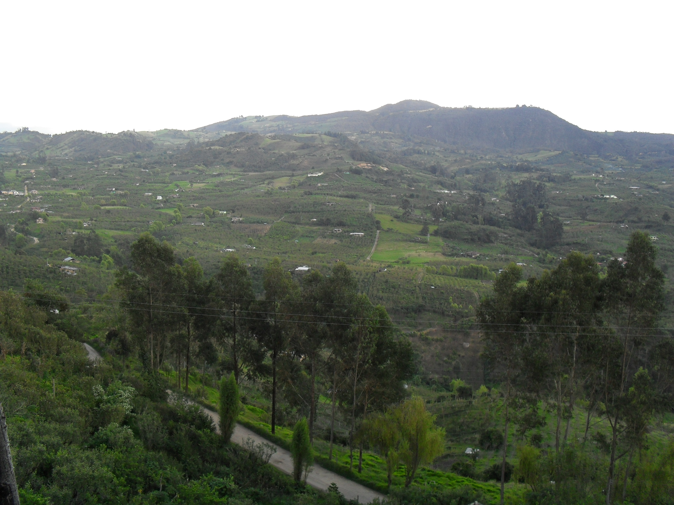 Parcelas cultivadas con frutales en el municipio de Nuevo Colón, Boyacá, Colombia